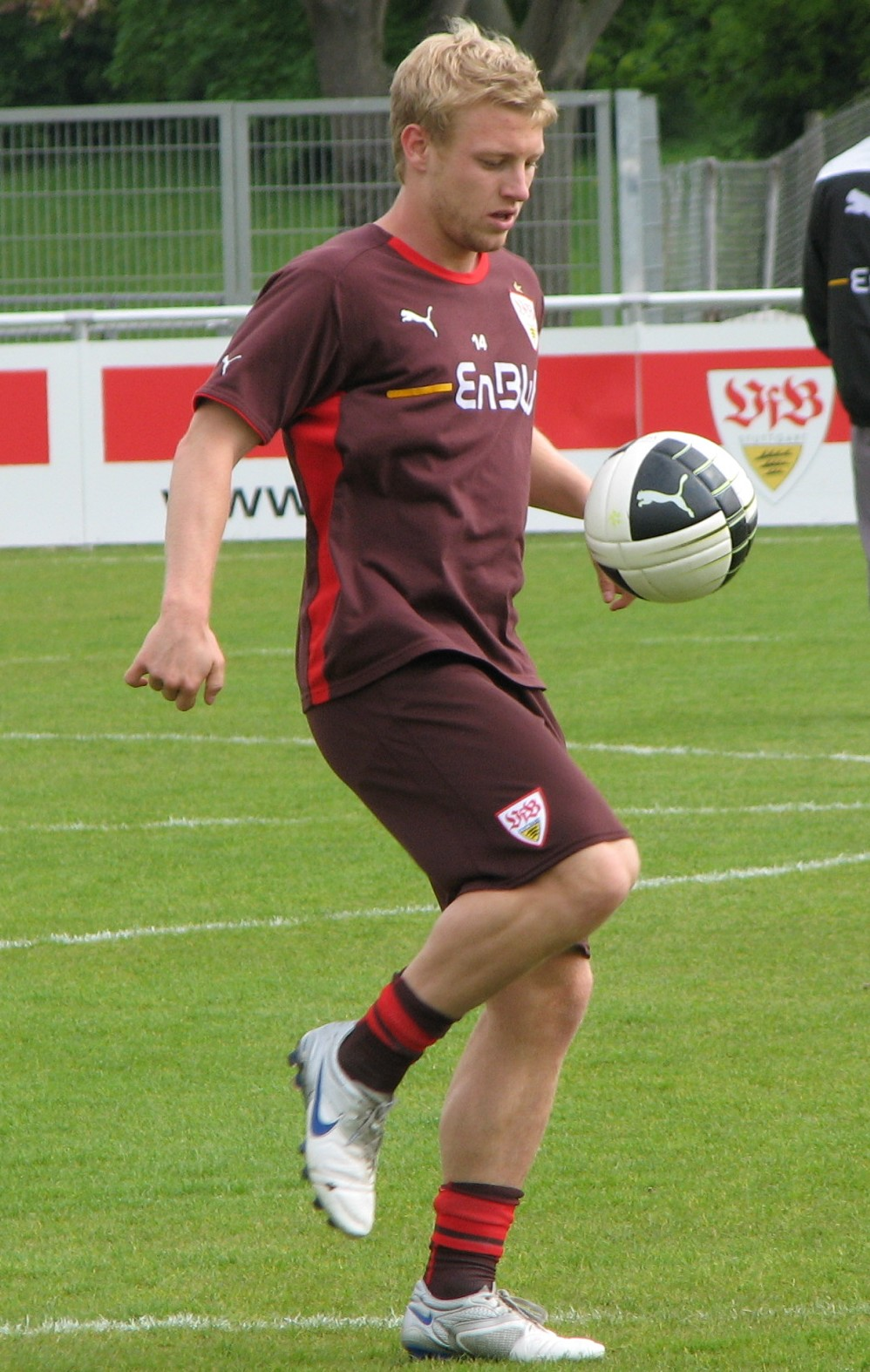 Patrick Funk beim Training am 11.05.2010. Aufgenommen von